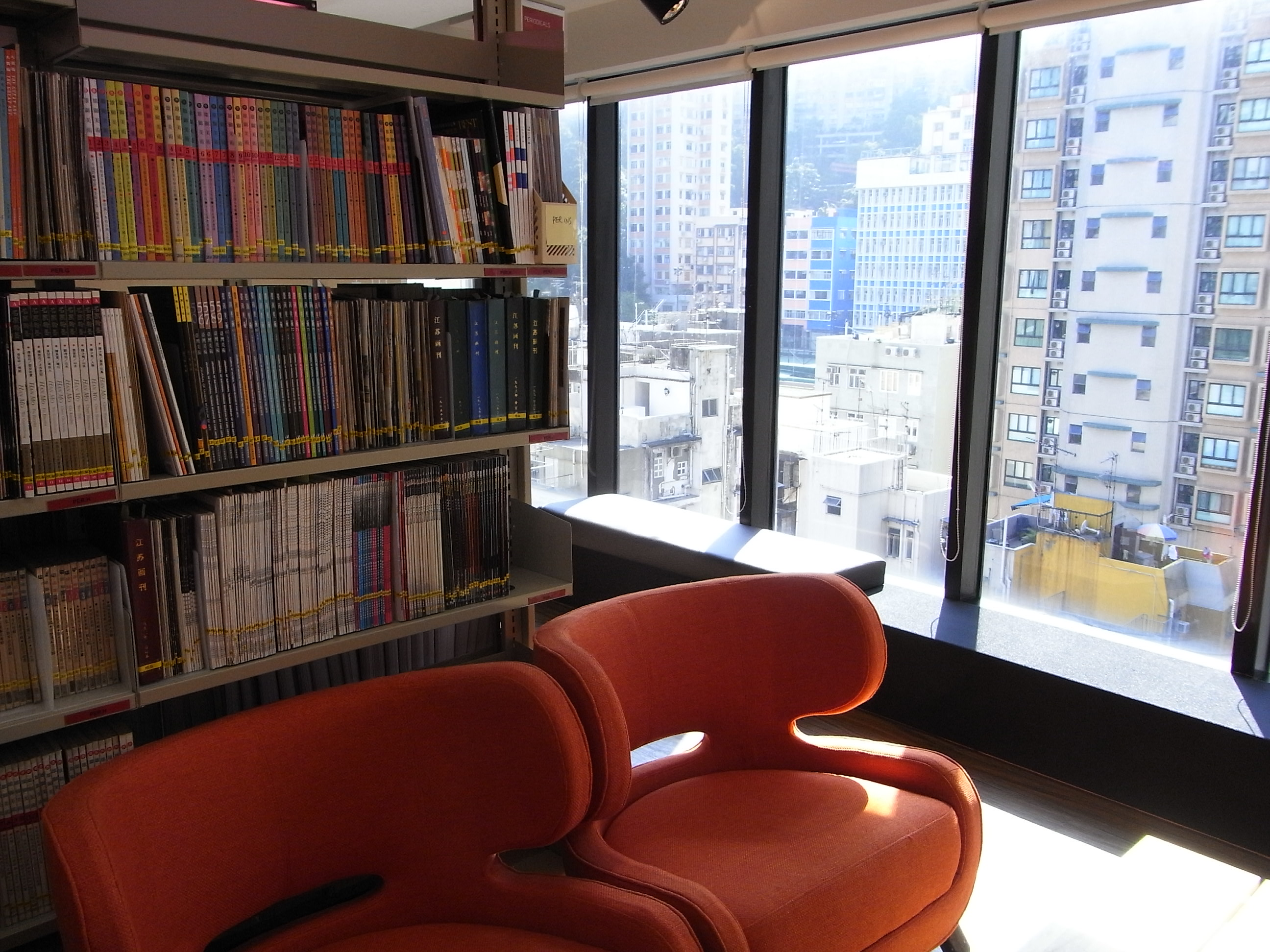 上環亞洲藝術文獻庫